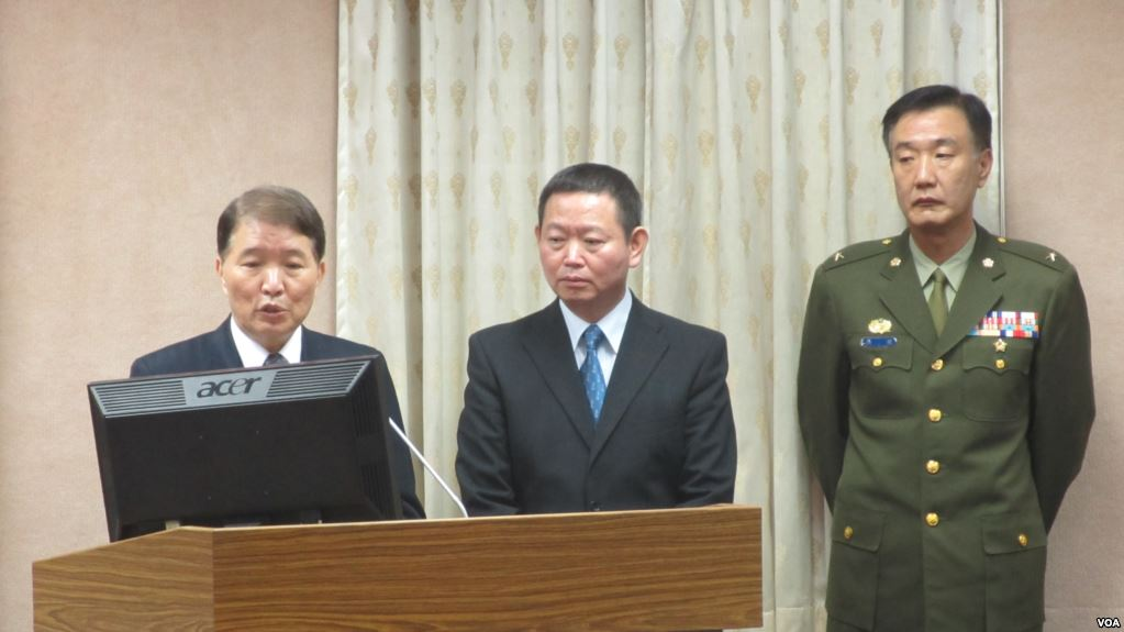 台灣軍方涉及非法搜索成為立法院質詢焦點